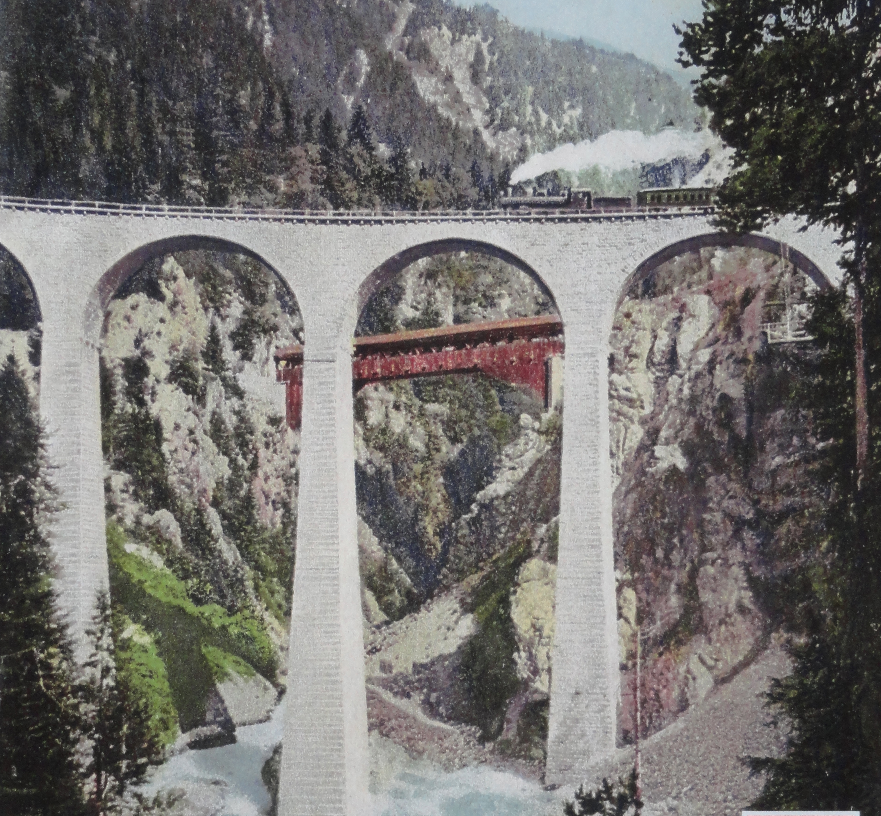 alte und neue Russeinerbrücke